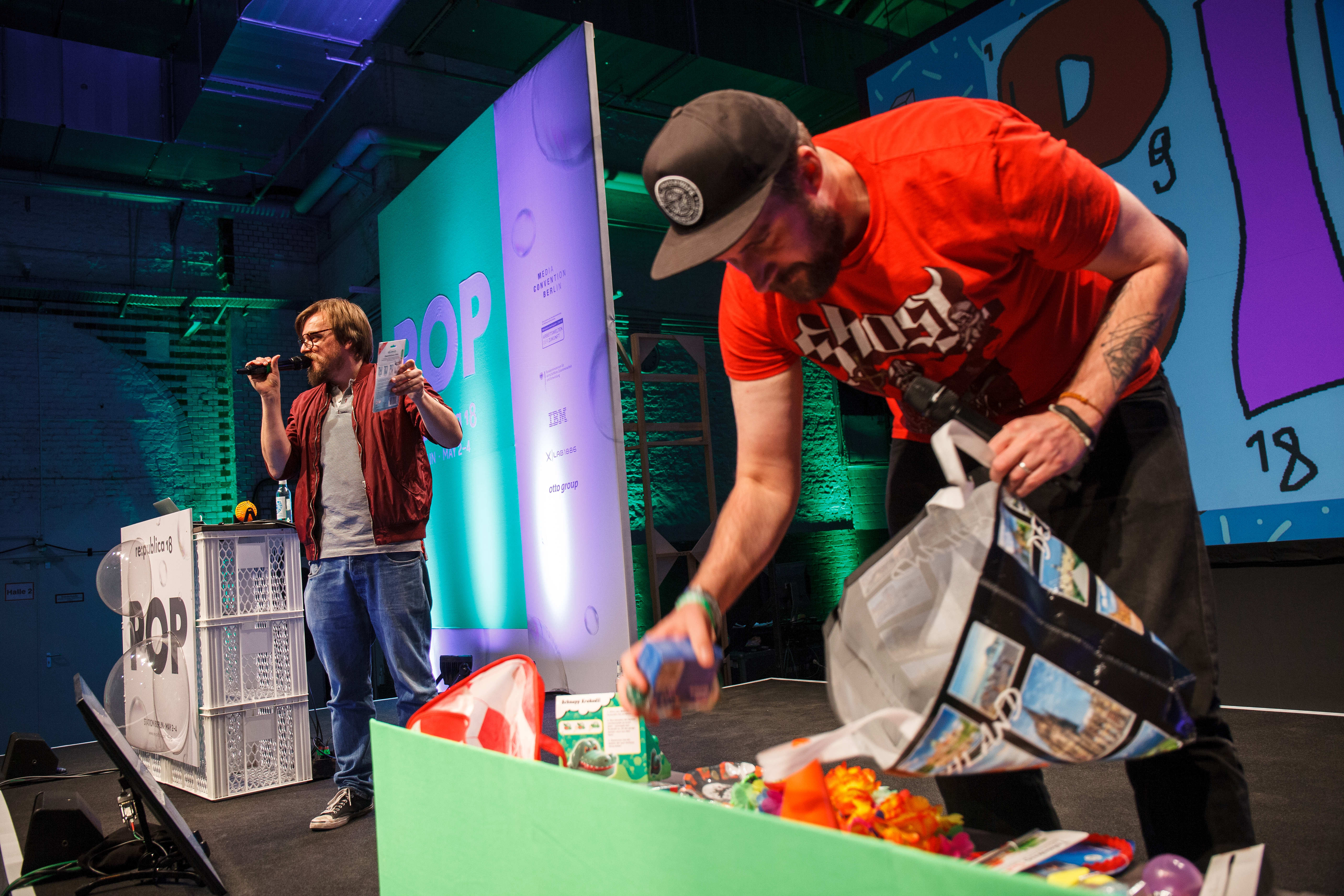 02.05.2018, Berlin: Talk: Bingo - Harmloser Spaß oder gefährlicher Extremsport? Speaker: Nilz Bokelberg, Maria Lorenz, Markus Herrmann. Die re:publica ist eine der weltweit wichtigsten Konferenzen zu den Themen der digitalen Gesellschaft und findet in diesem Jahr vom 02. bis 04. Mai in der STATION-Berlin statt. Foto: Jan Zappner/re:publica